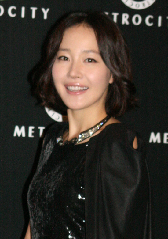 2010년 9월 9월 열린 2010 메트로시티 패션쇼 & 파티에서의 엄지원.